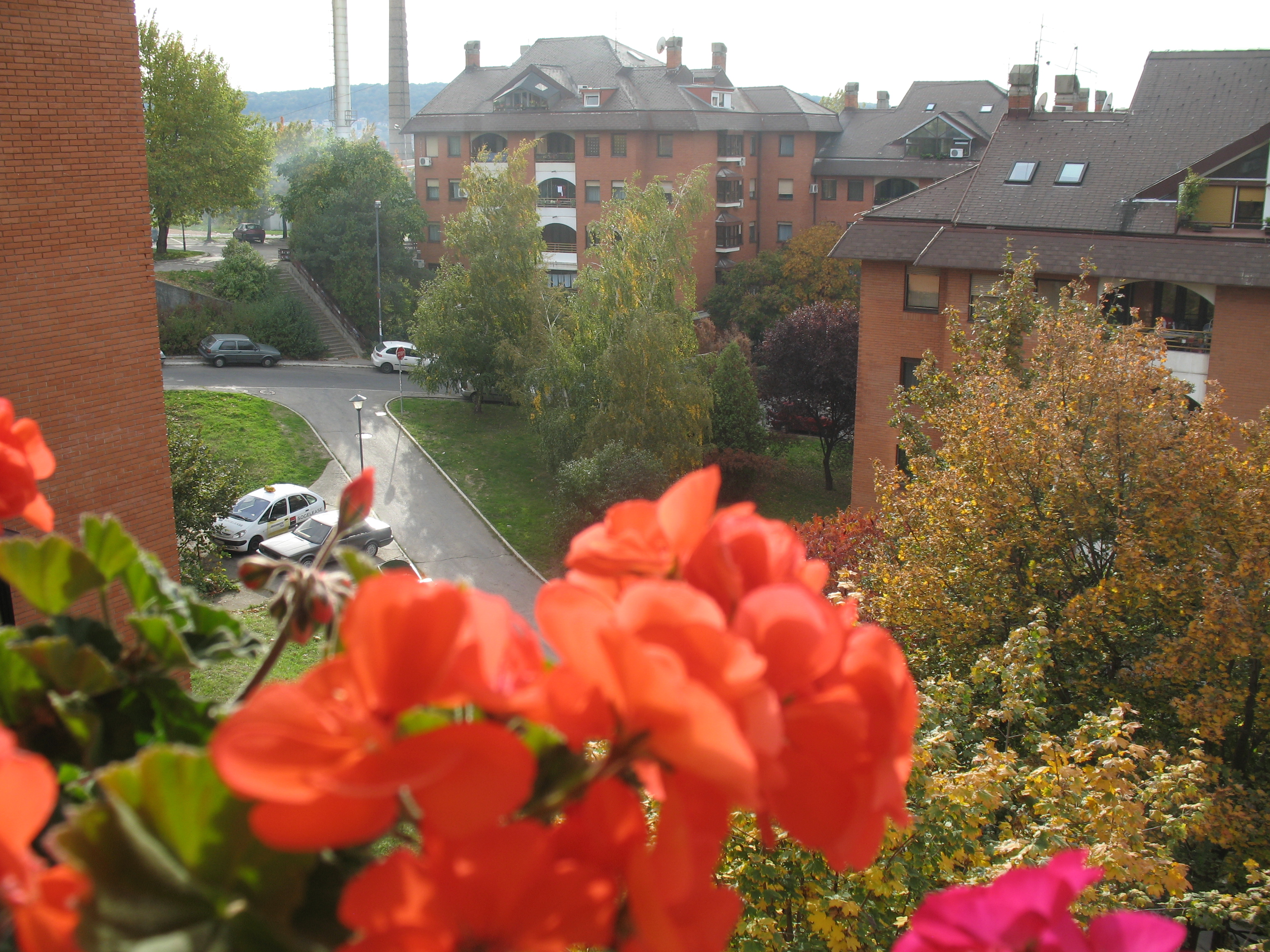 Višnjička banja, Beograd, Serbia